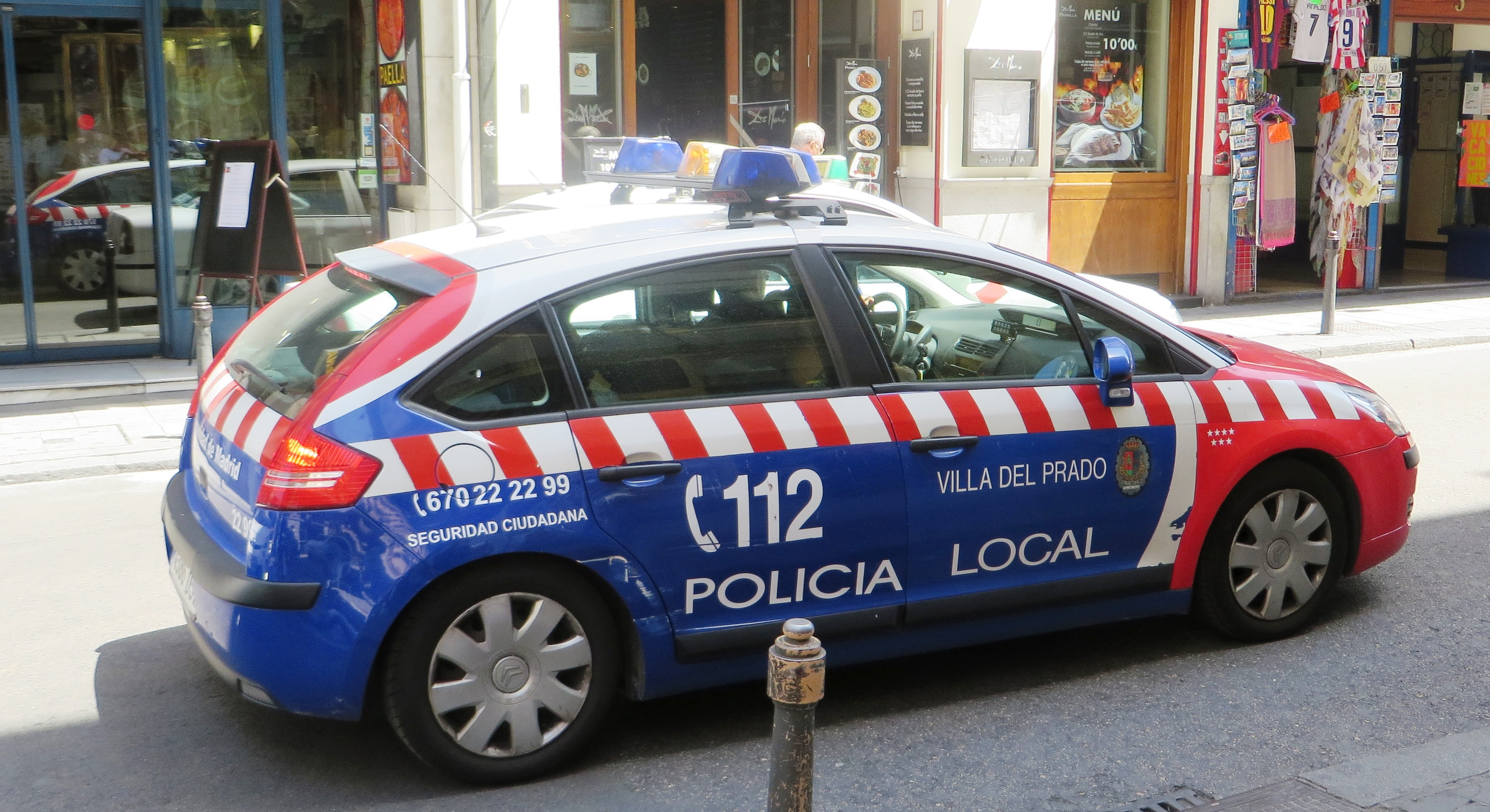 Locale politie - Villa del Prado